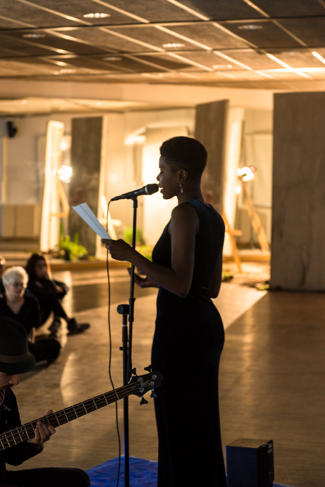 DNA